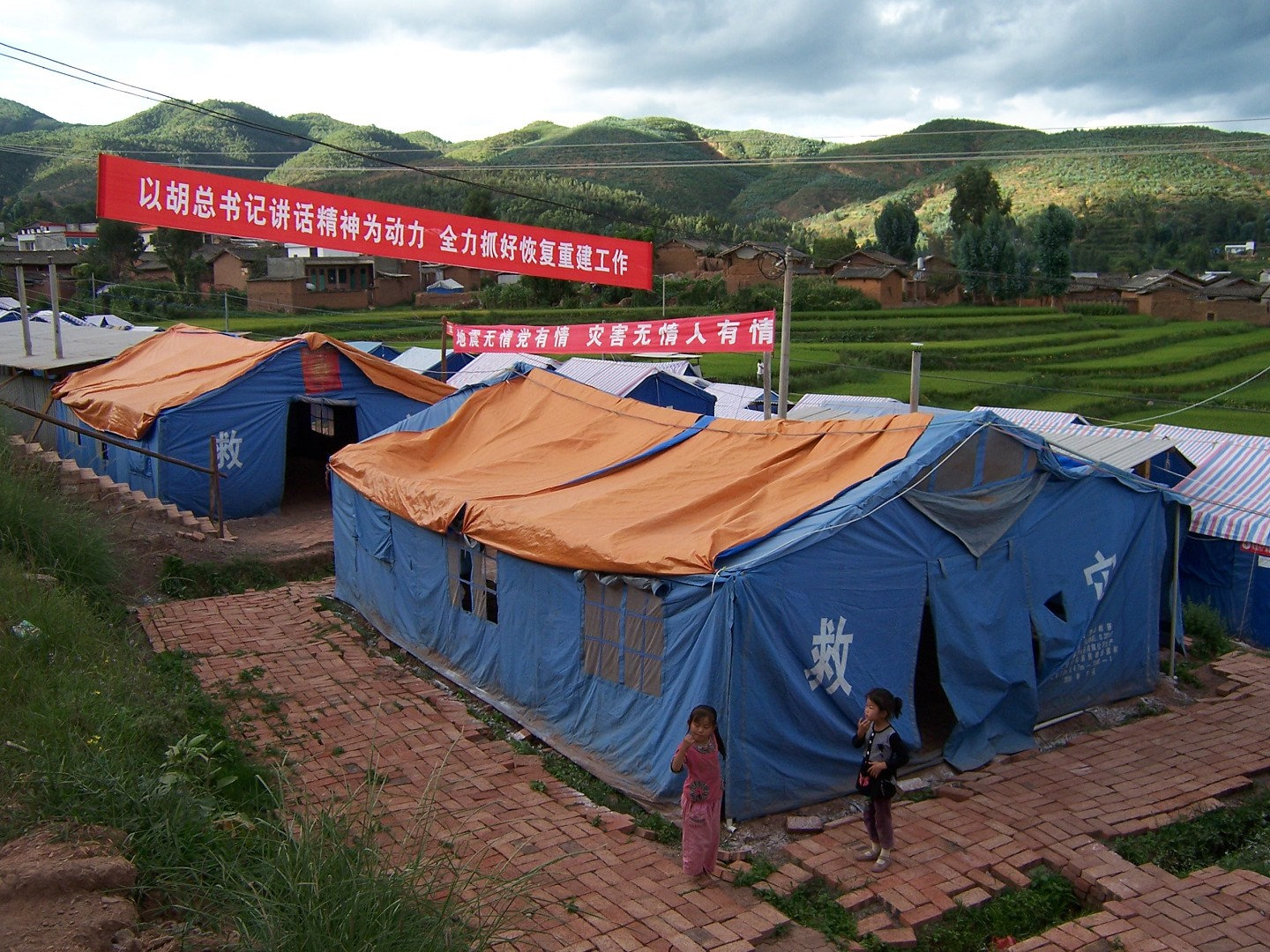 官屯灾民帐篷